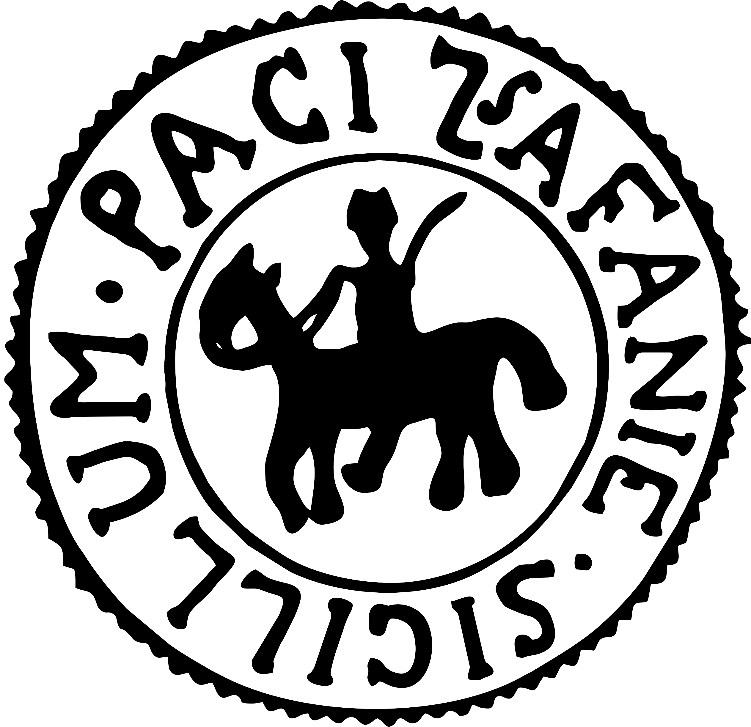 zastranie